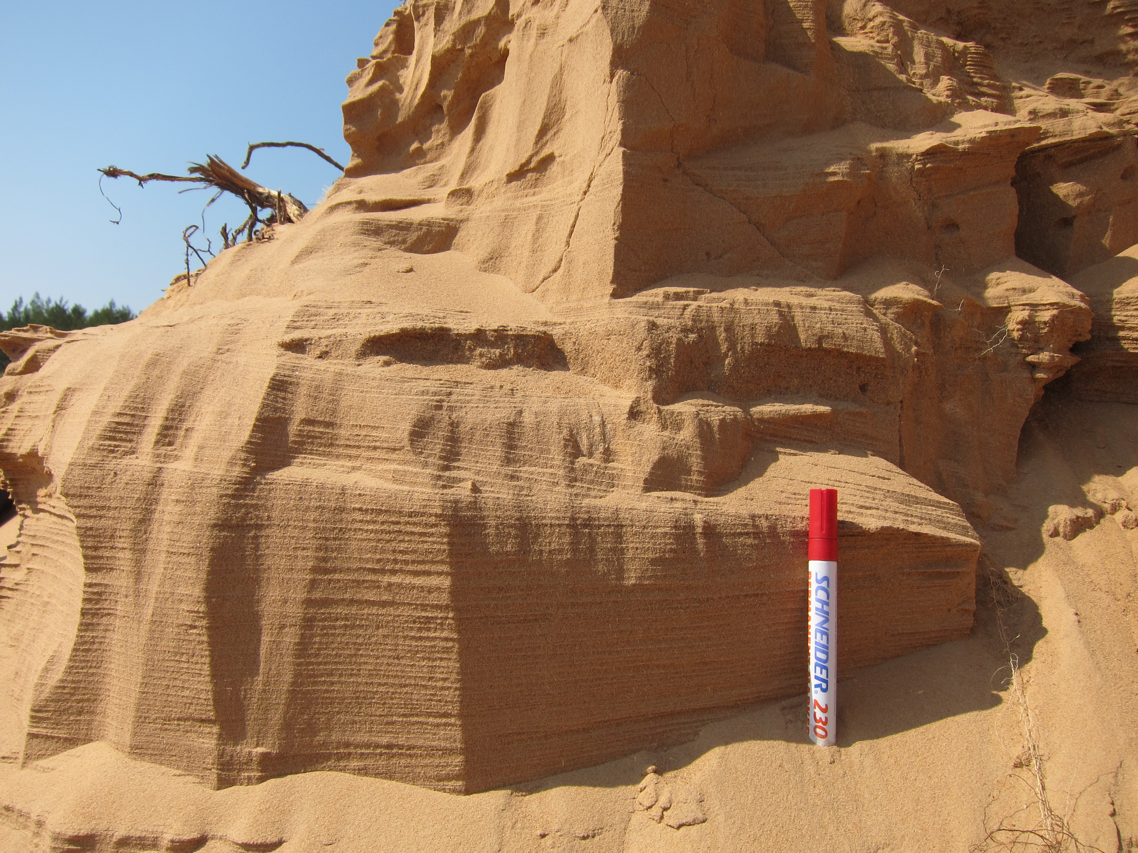 kihilisest liivast koosnev luide